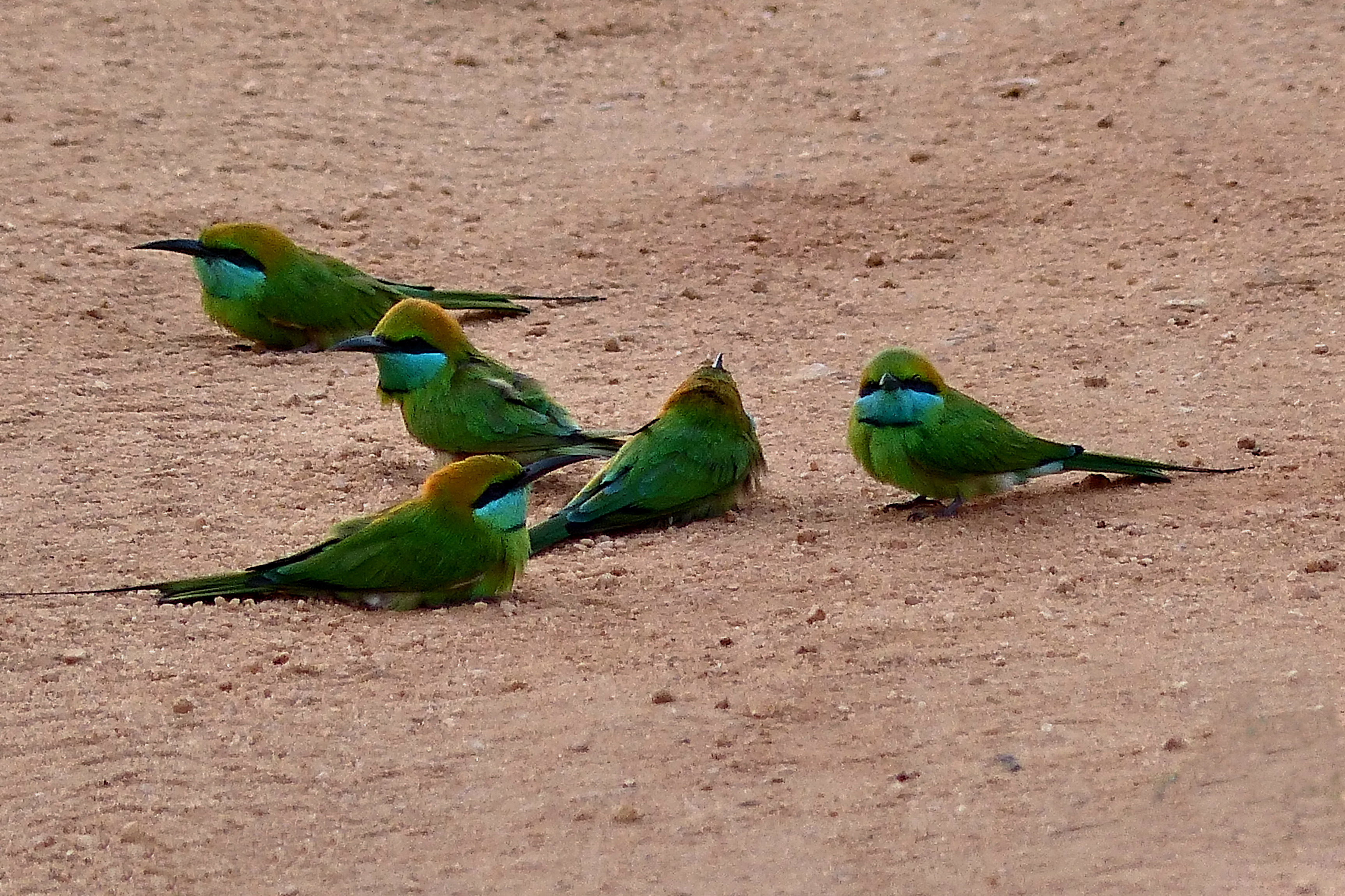 Smaragdspinte in Sri Lanka, Merops orientalis, im Sand badend